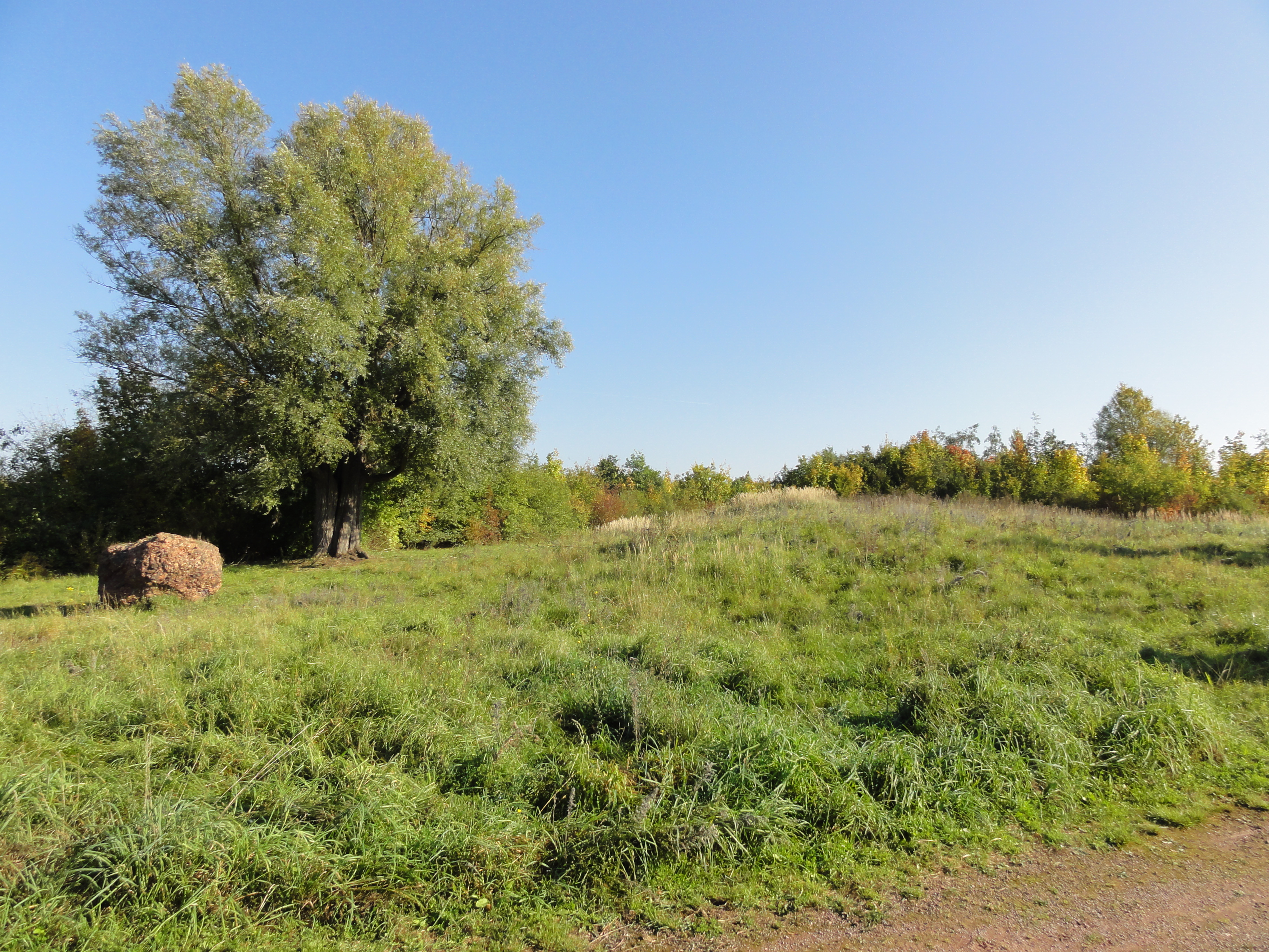 Terril n° 118 dit 1 d'Oignies, Fosse n° 1 de la Compagnie des mines d'Ostricourt, Oignies, Pas-de-Calais, Nord-Pas-de-Calais, France.